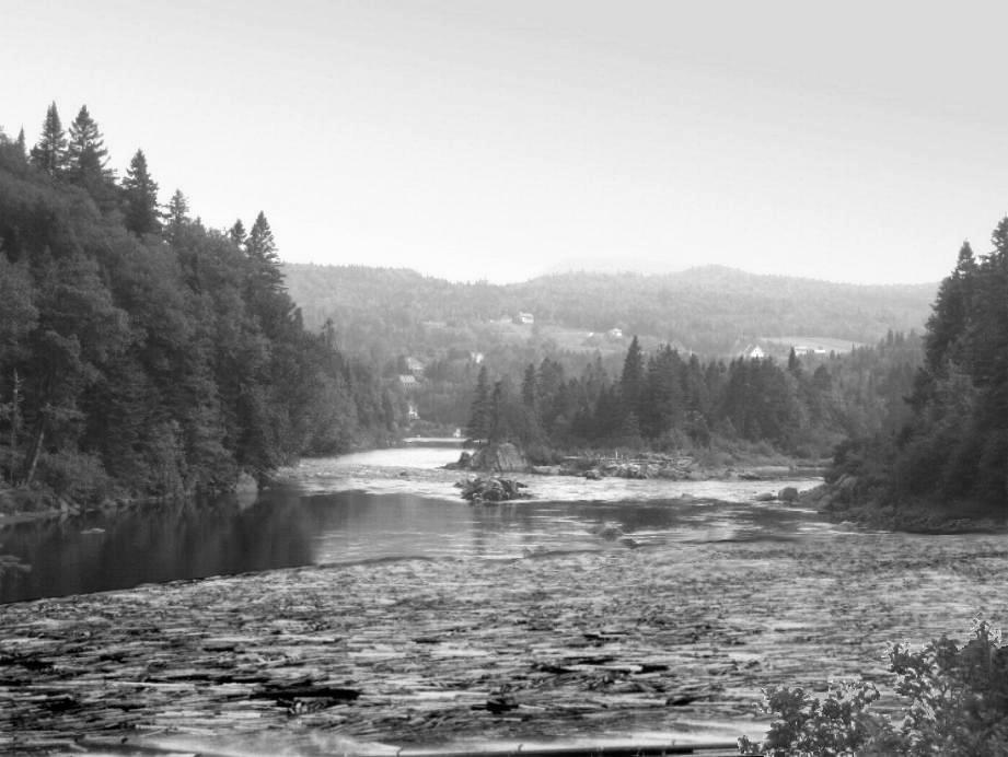 Flottage de bois sur la Jacques-Cartier à Tewkesbury Qc Canada (Noir et blanc)